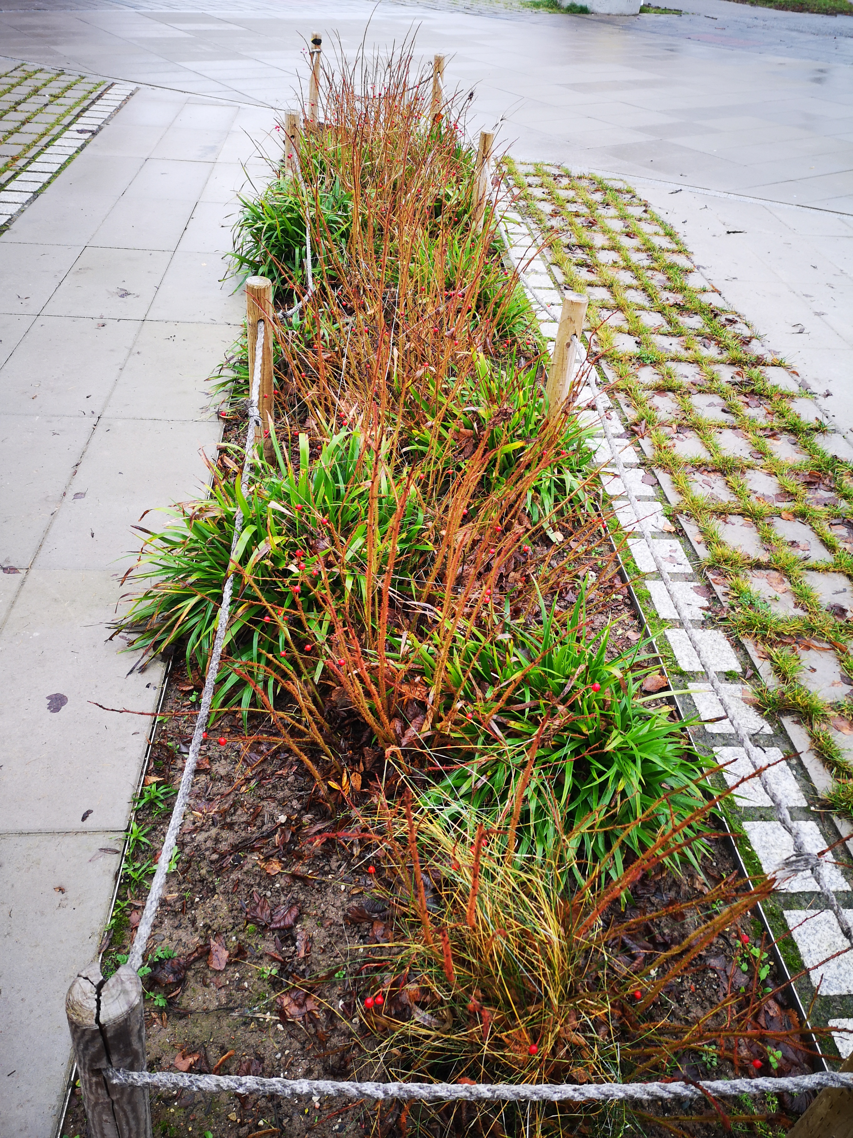 Lillepeenart kasutatakse tavaliselt esteetilisel eesmärkidel.